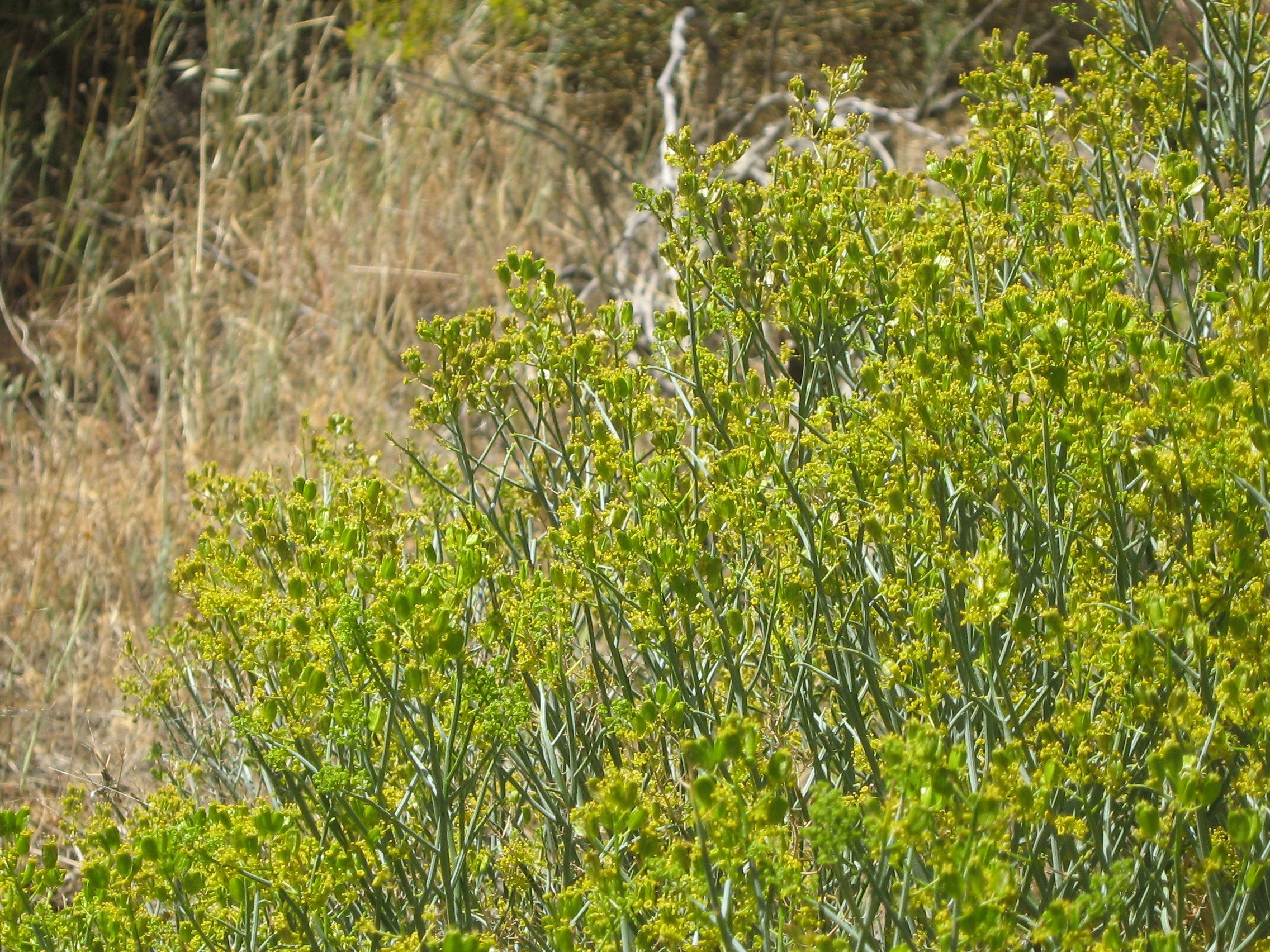 Gymnophyton isatidicarpum (C.Presl ex DC.)Mathias et Constance, Cajon de Maipo, san Alfonso, Chile